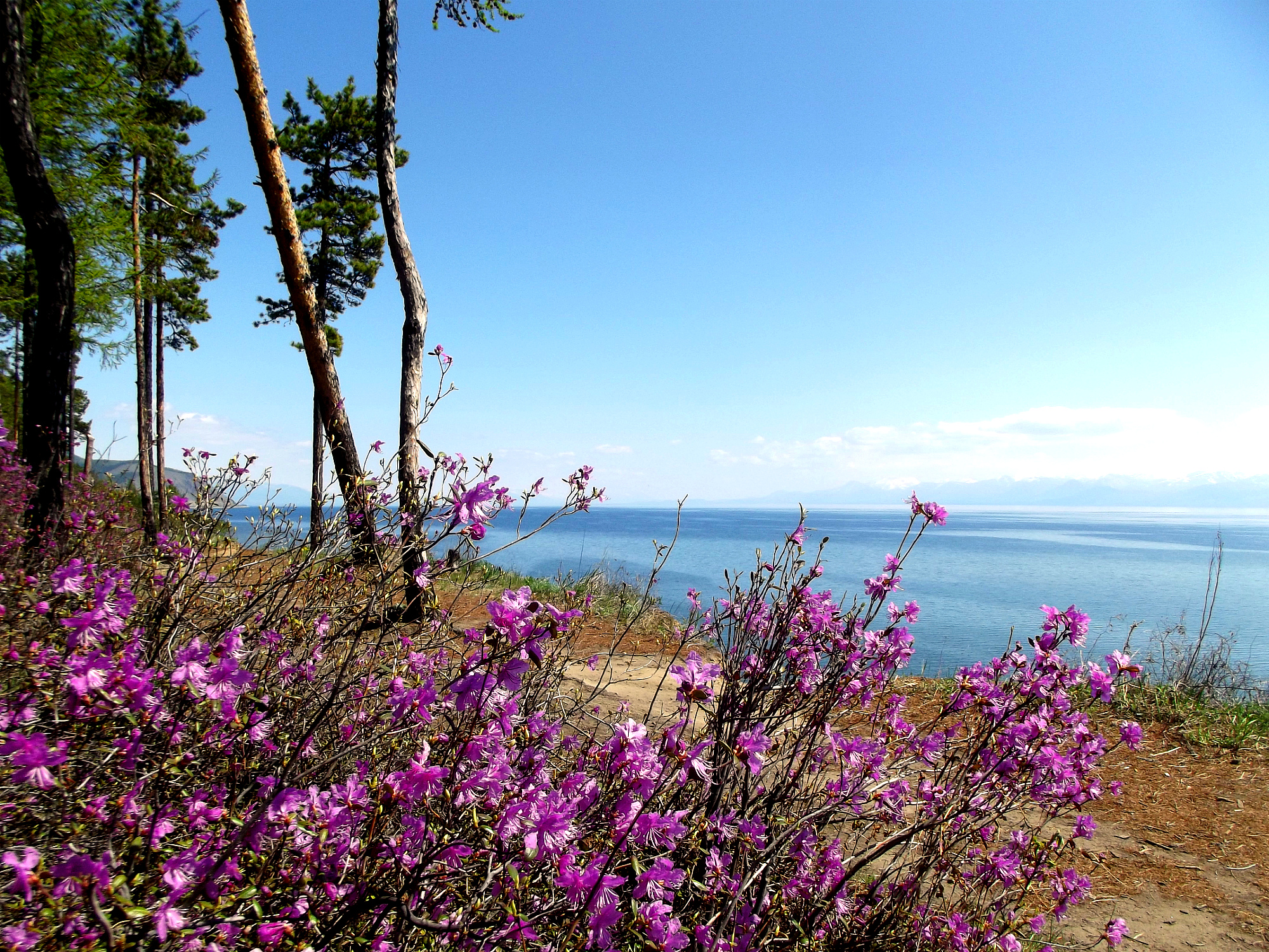 Северо-Байкальская, Северобайкальский район This image is related to the protected area of Russia number 0320099